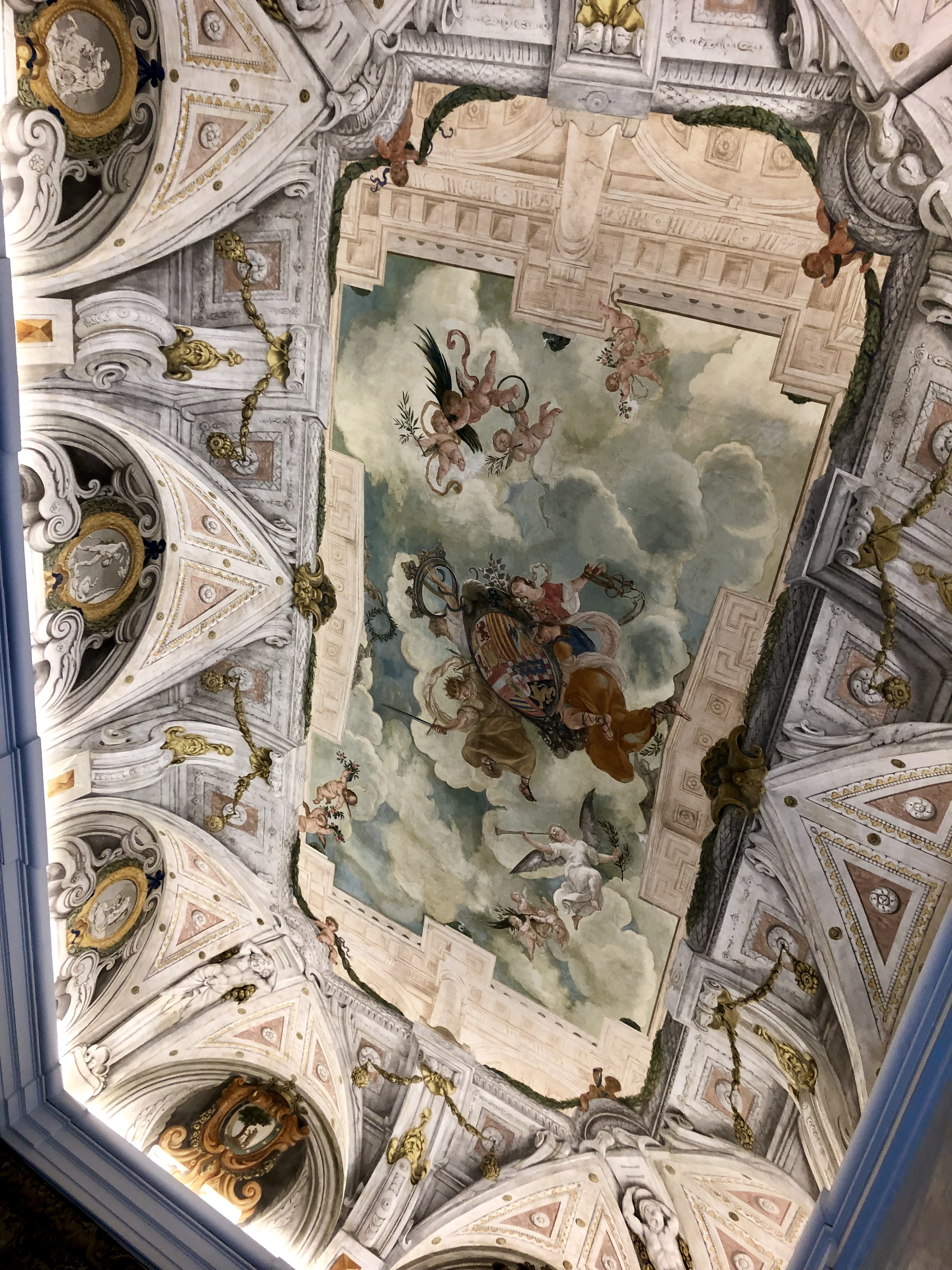 Salón Real de la Casa de la Panadería. Madrid, España